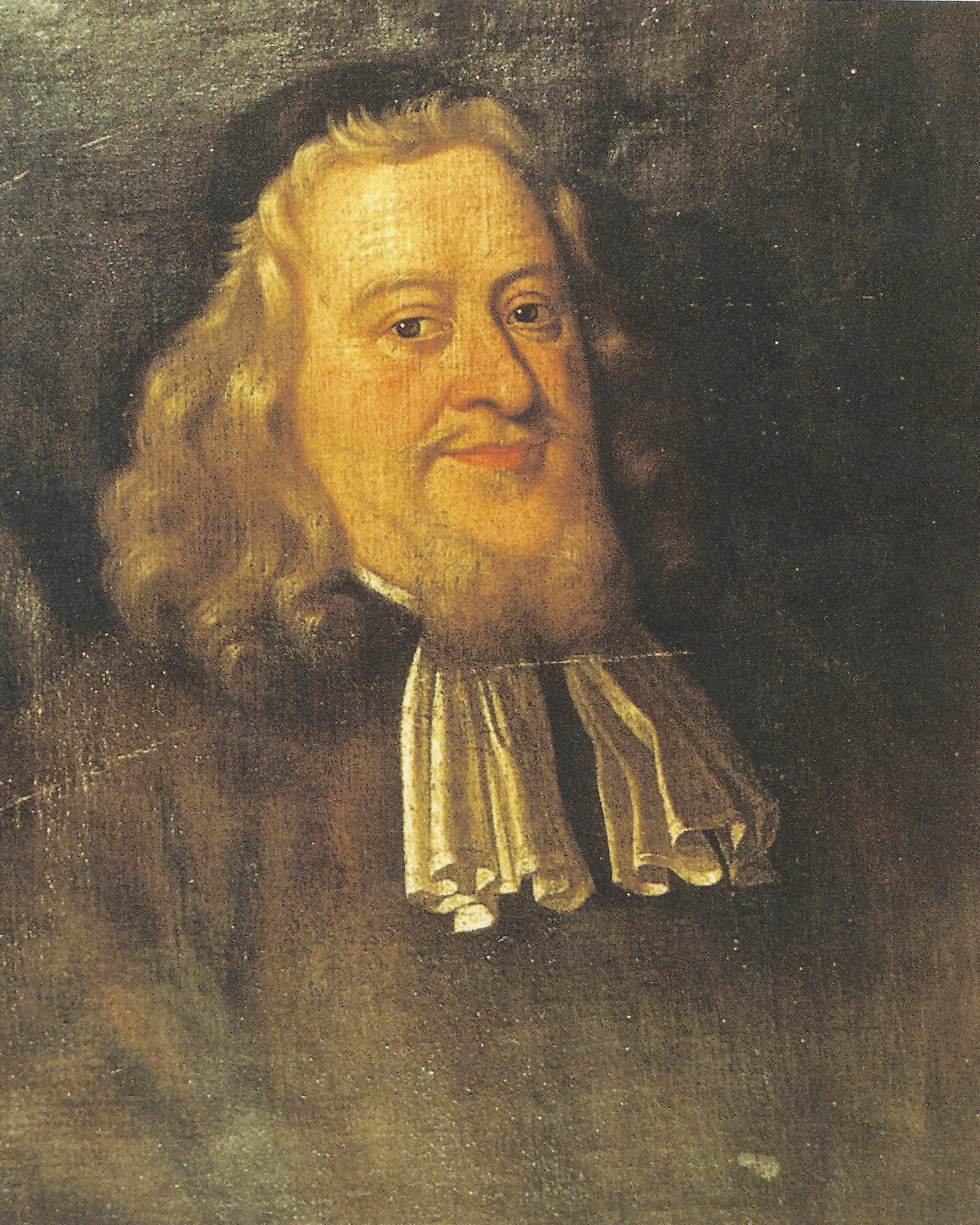 Leffmann Behrens, jüdisch Elieser (Ezechiel) Lippmann Cohen (geboren 1634 in Bockum; gestorben 1. Januar 1714 in Hannover), war ein deutscher Schutzjude, Hofjude sowie Hof- und Kammeragent (Bankier) der hannoverschen Herzöge der Welfen im späten 17. und beginnenden 18. Jahrhundert. „Das einzige Porträt Leffmann Behrens' von Andreas Scheidt findet sich farbig reproduziert in Louis and Henry Fraenkels Genealogical tables of Jewish families (München 1999 Seite 28)“